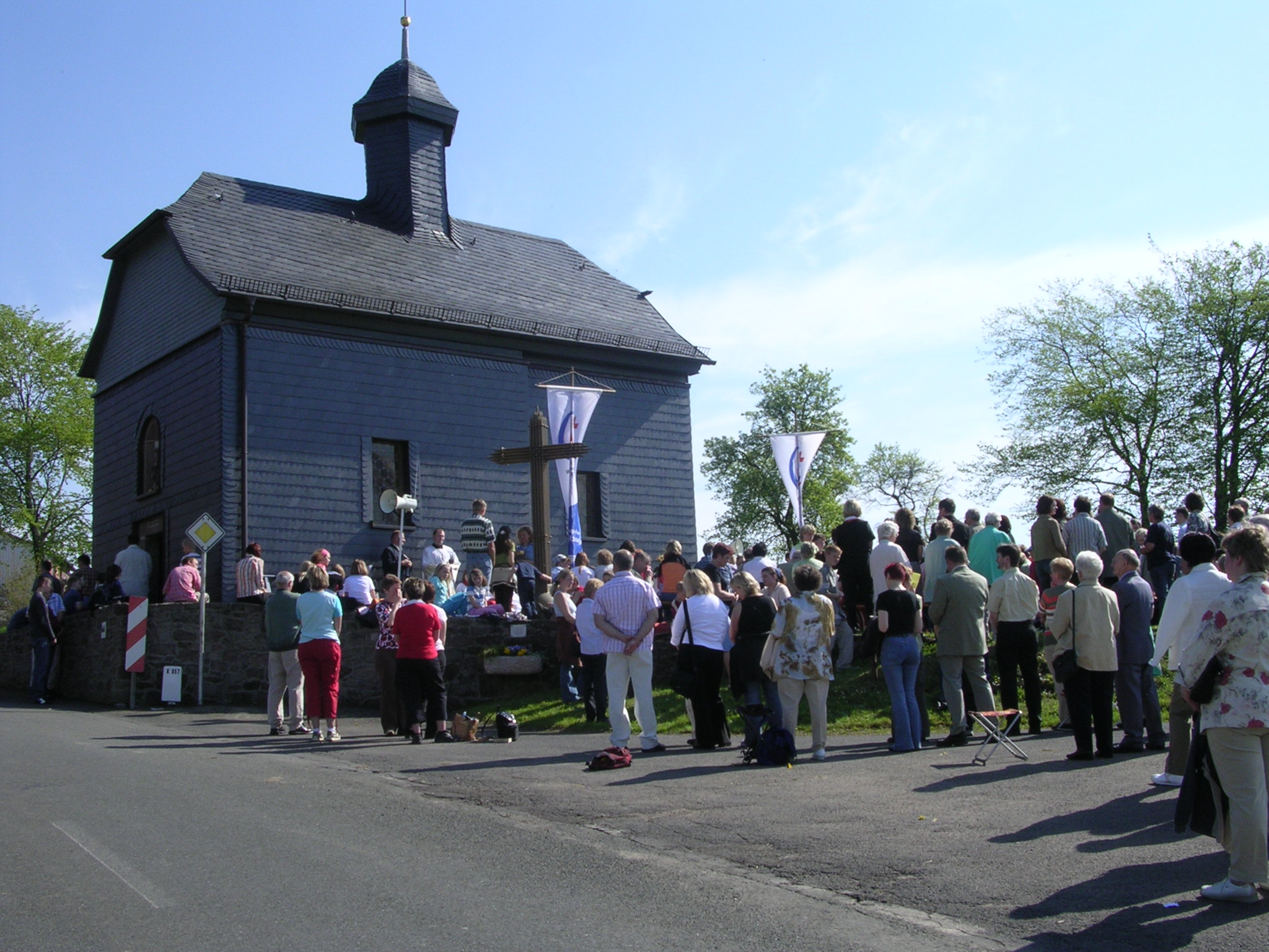 Kapelle zu Klesberg bei der jährlichen Bittprozession der Ulmbacher Pfarrgemeinde